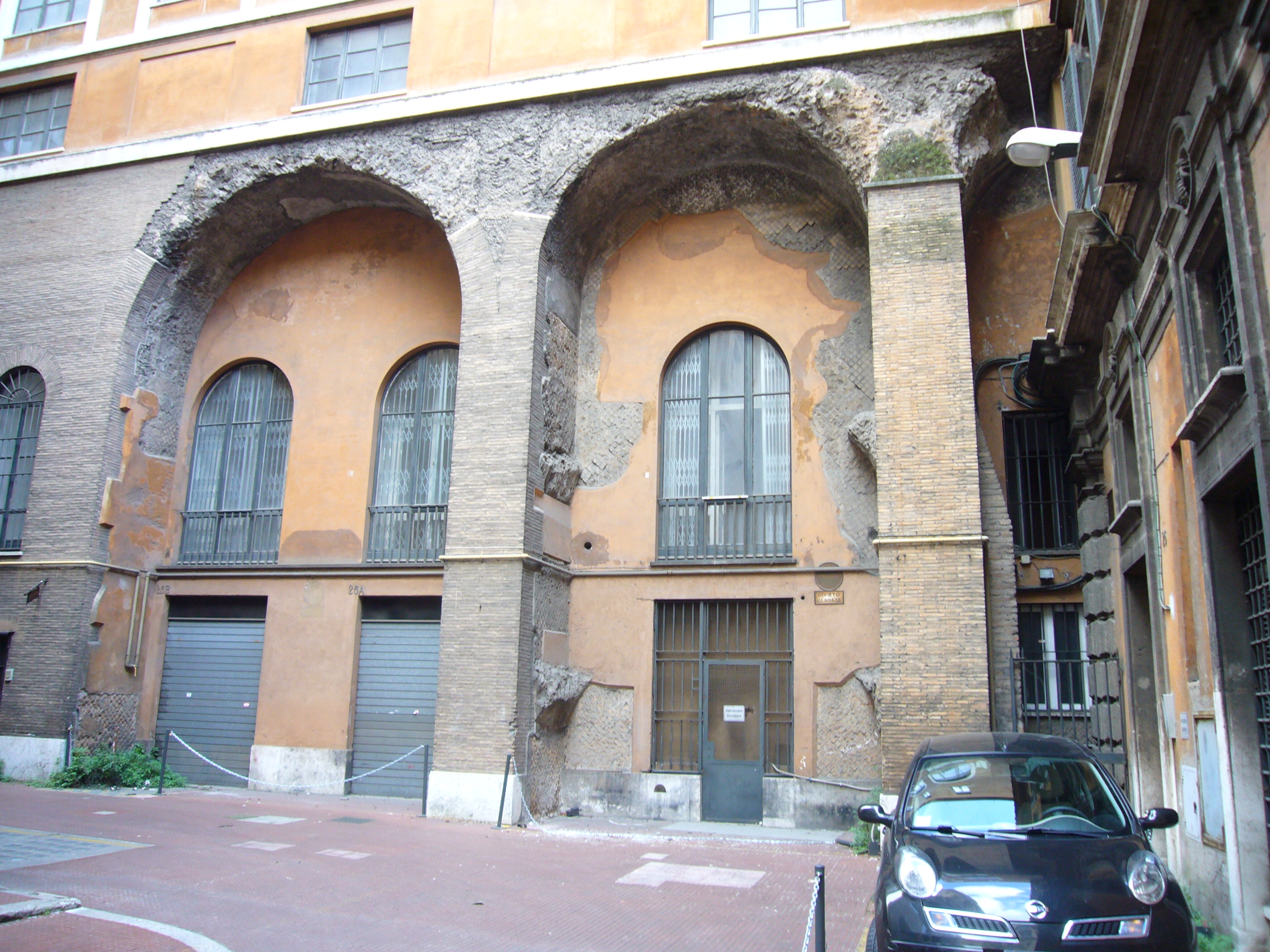 Roma, via Barberini, resti del Circo di Flora sotto Palazzo Barberini